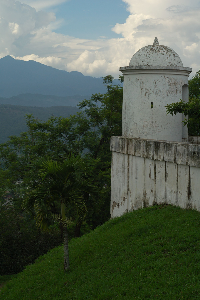 Fuerte de San Cristóbal, en el deparatamento de Lempira, Honduras, América Central, La edificación fue construida en 1863, con adobe y ladrillo, sobre el cerro San Cristóbal y en la misma reposan los restos del gobernante hondureño Juan Lindo, cuya tumba está localizada en la parte norte del perímetro.